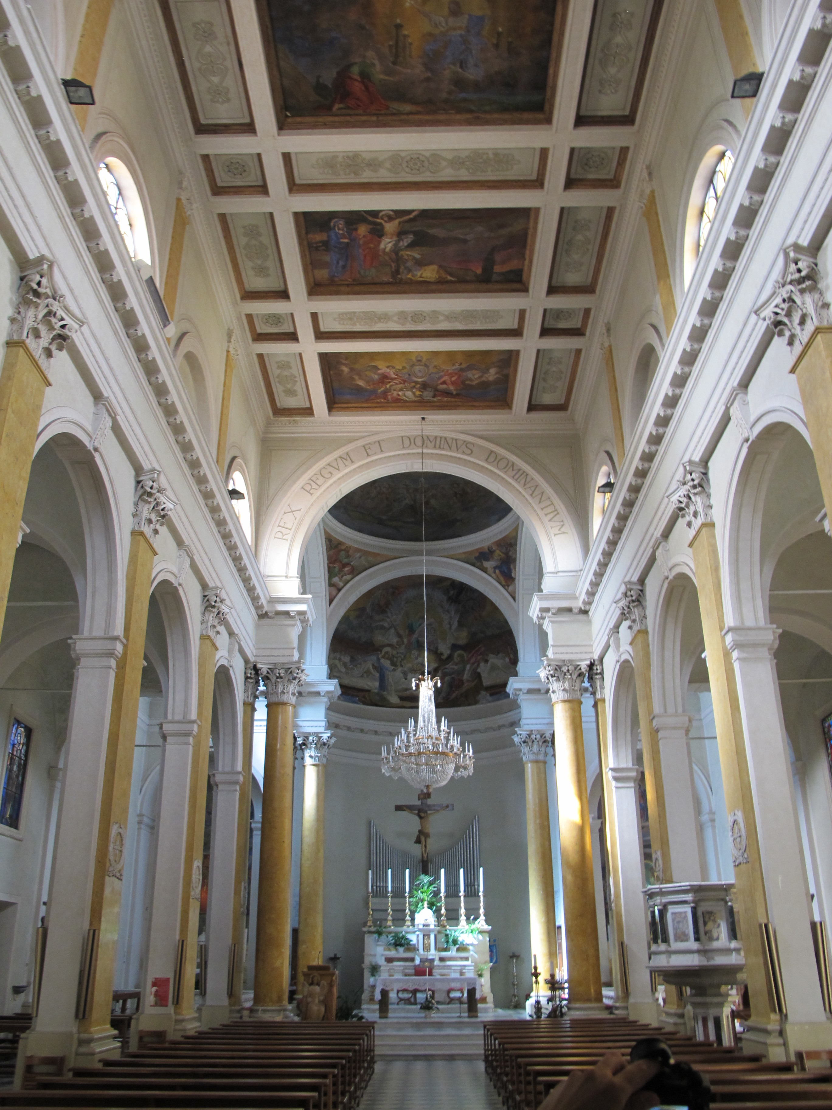 Ponsacco